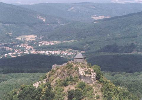 Salgó várának látképe.